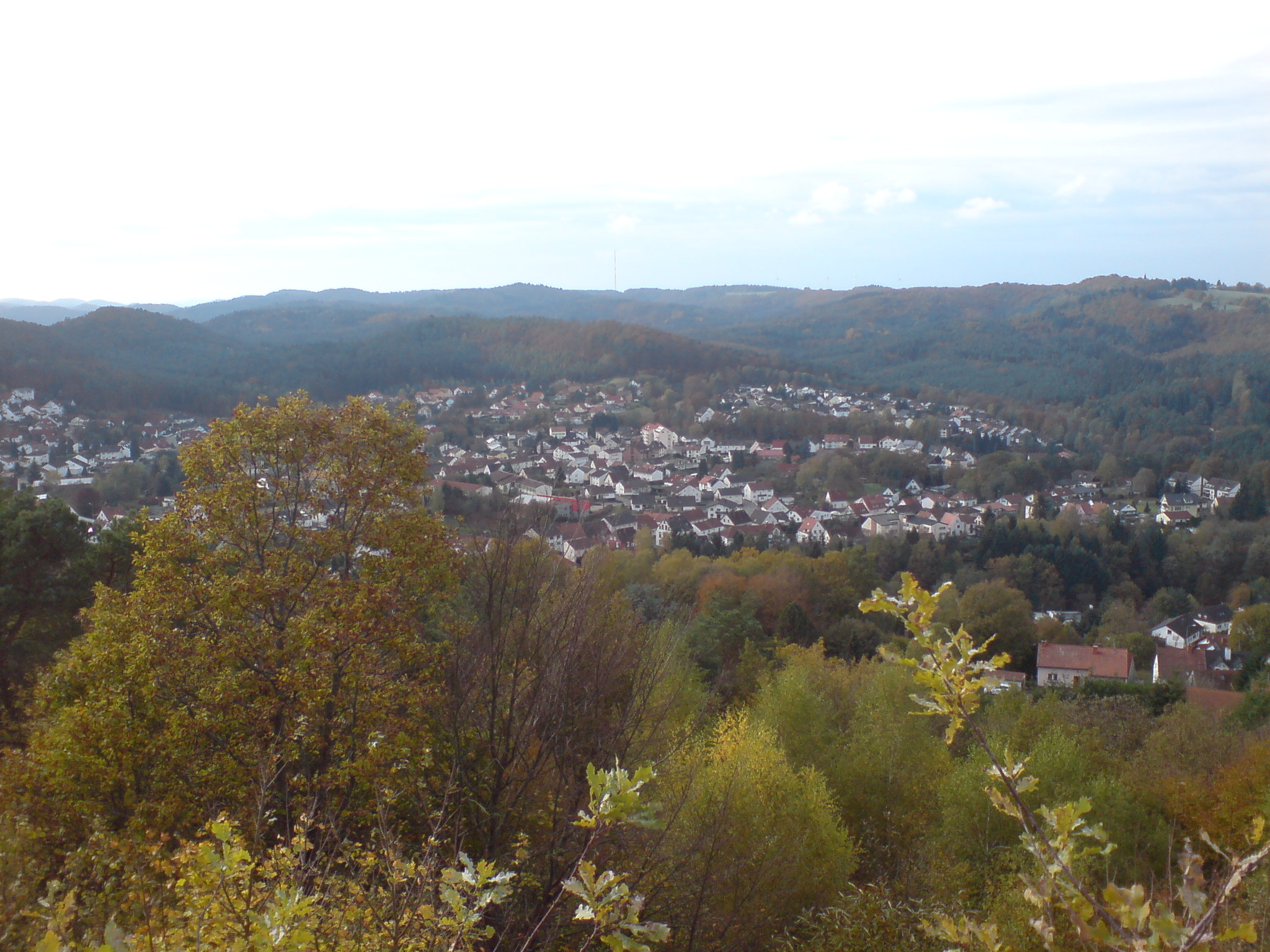 Blick über Lemberg.